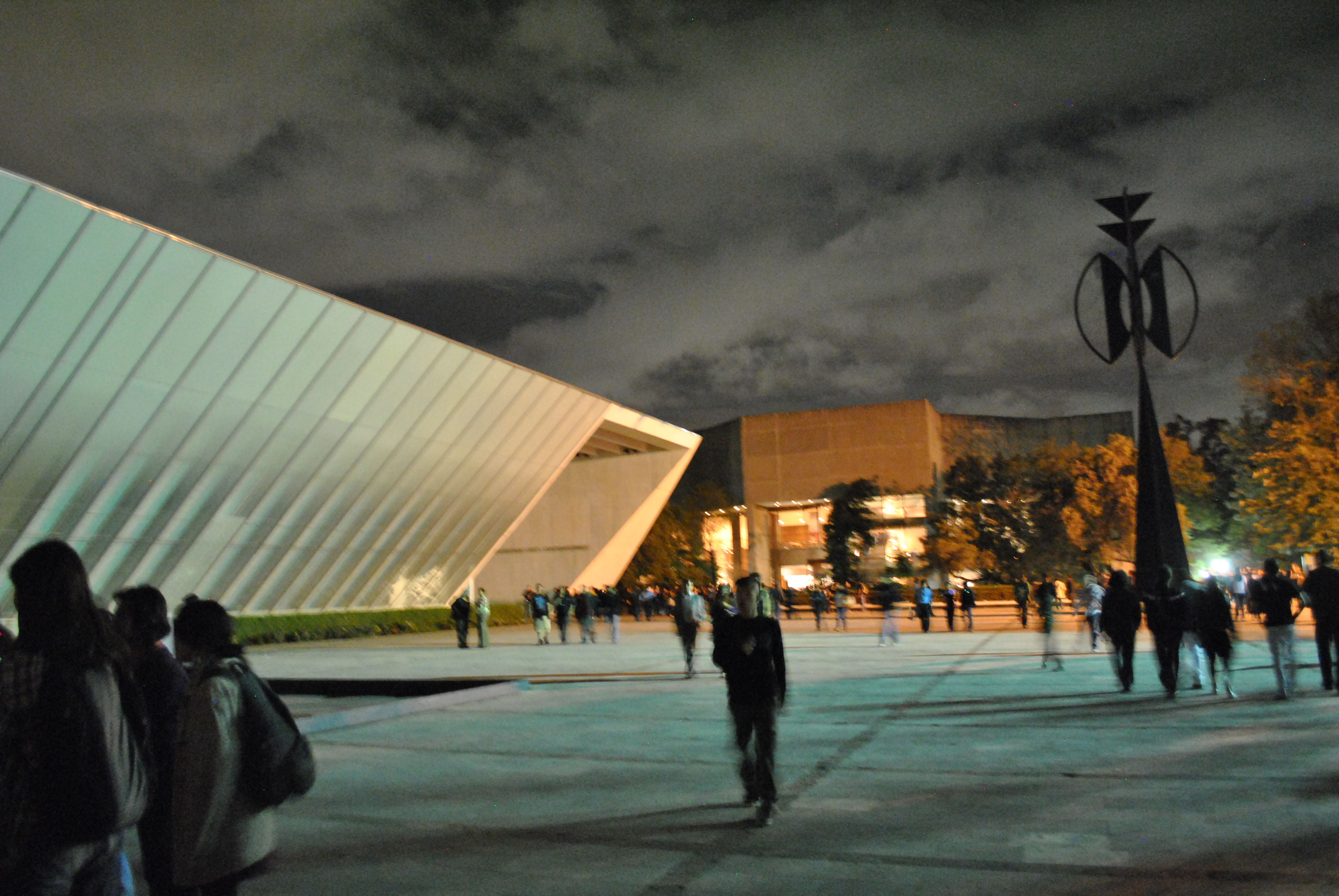 Museo Universitario de Arte Contemporáneo en Ciudad Universitaria, obra de Teodoro González de León. A la derecha la escultura "La Espiga" de Rufino Tamayo.